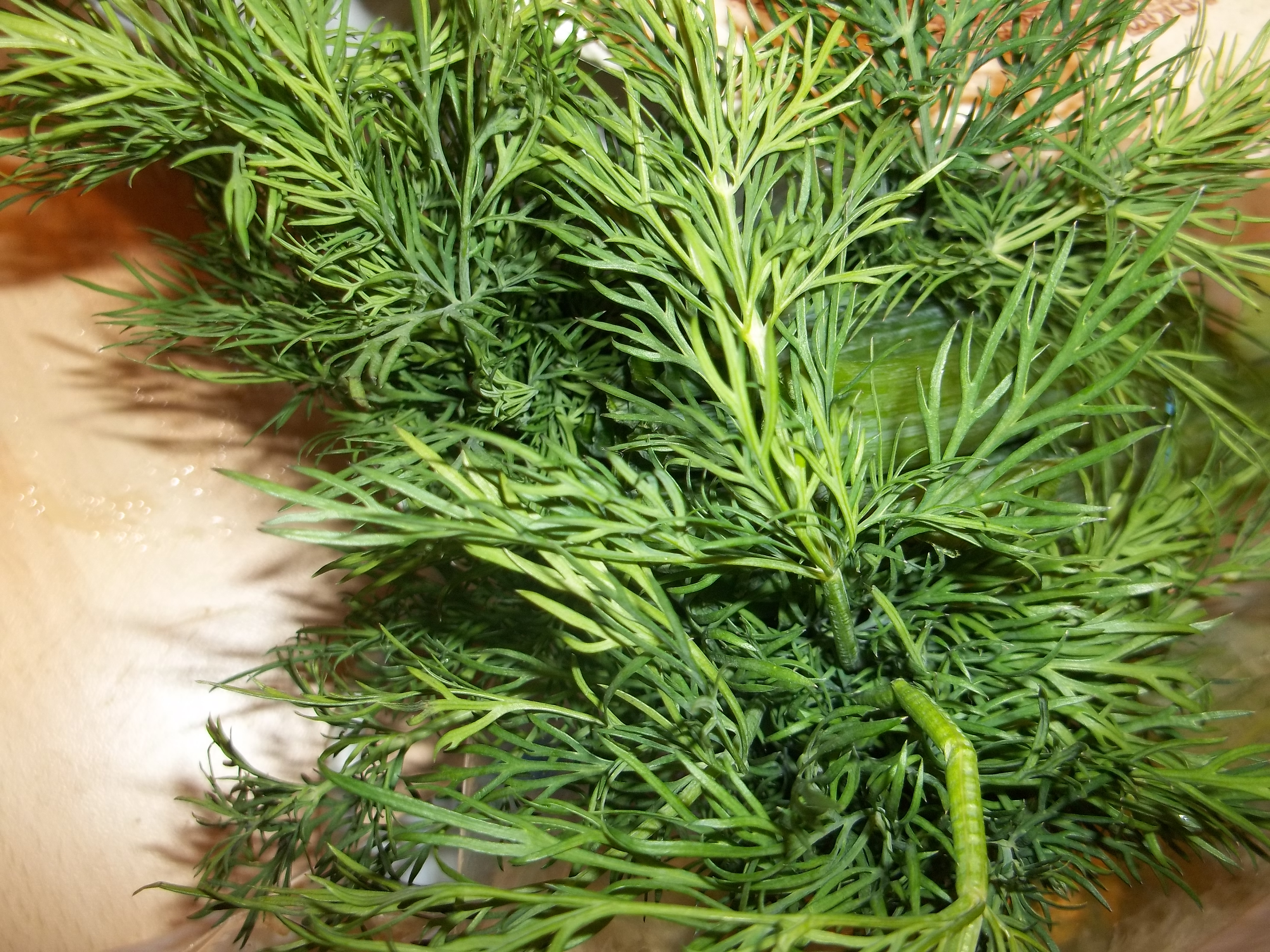 Krapai